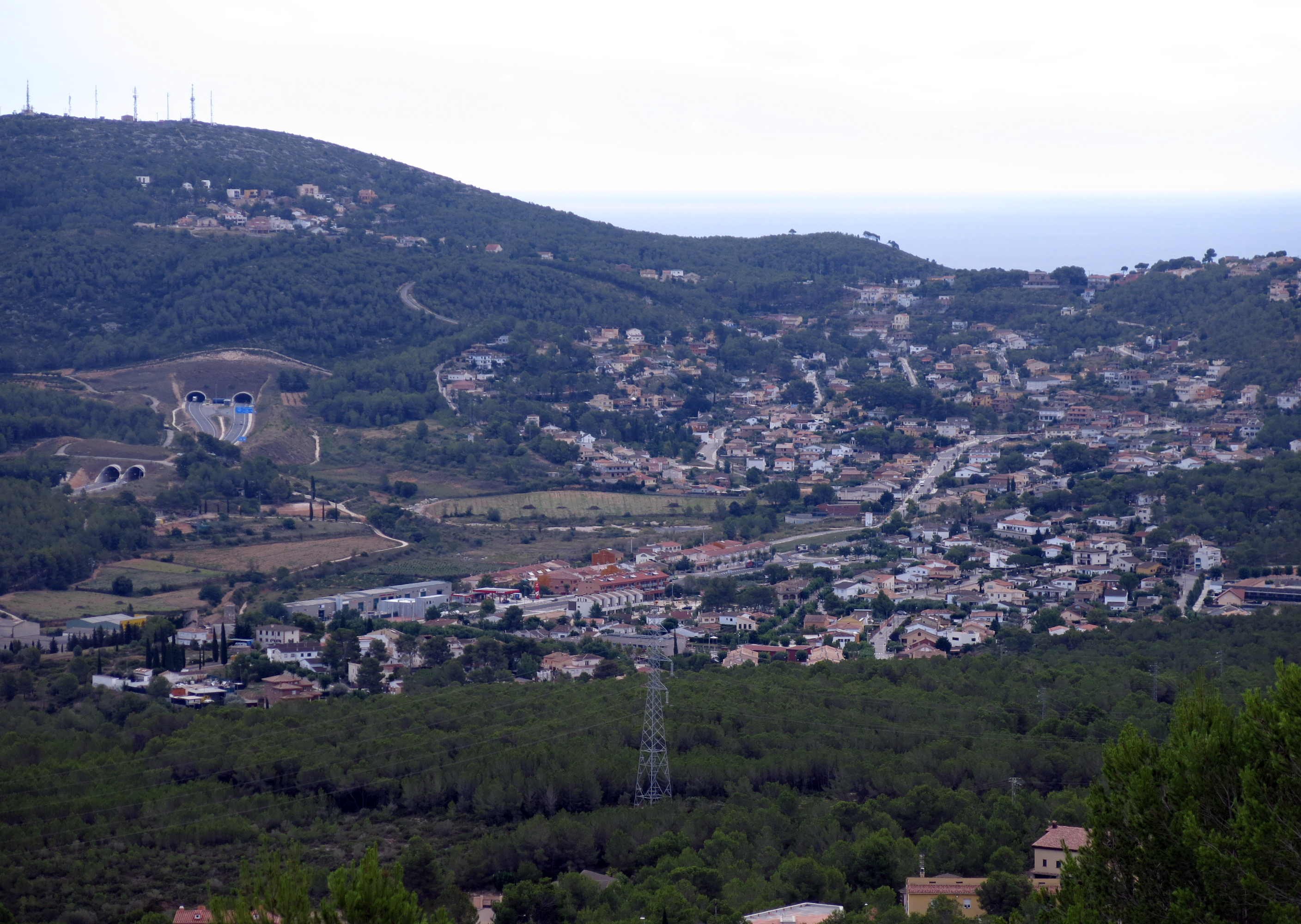 Canyelles des del jaciment d'Olèrdola